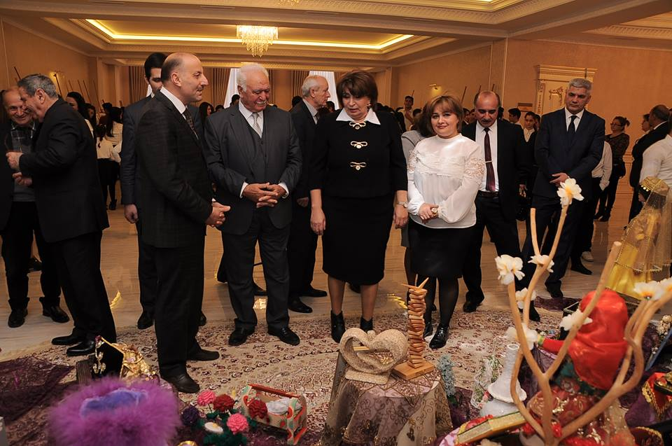 Əvəz Mahmud Lələdağ tədbirdə